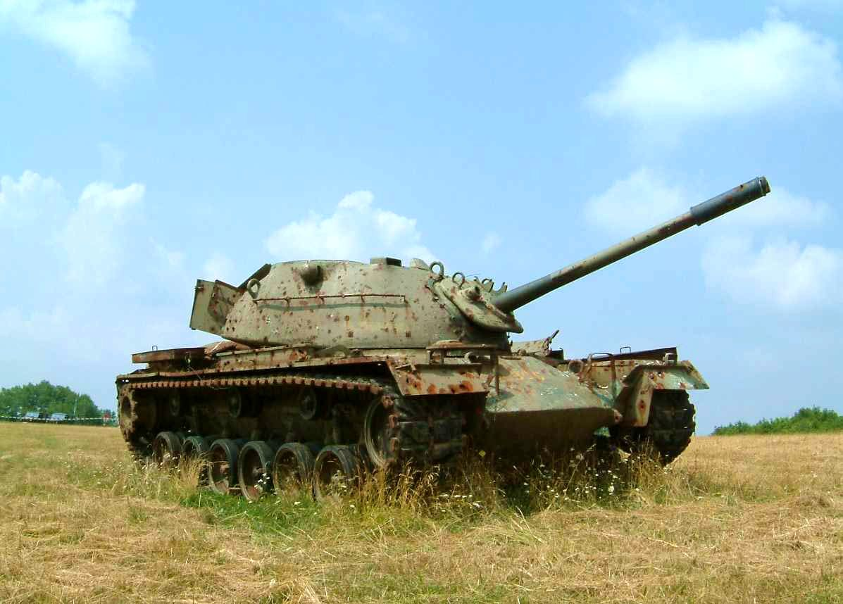 Wrack eines M 48-Kampfpanzers auf dem Truppenübungplatz Hammelburg